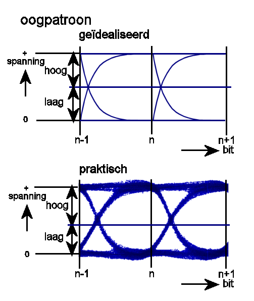 lokaal datasignaal, geidealiseerd en praktisch